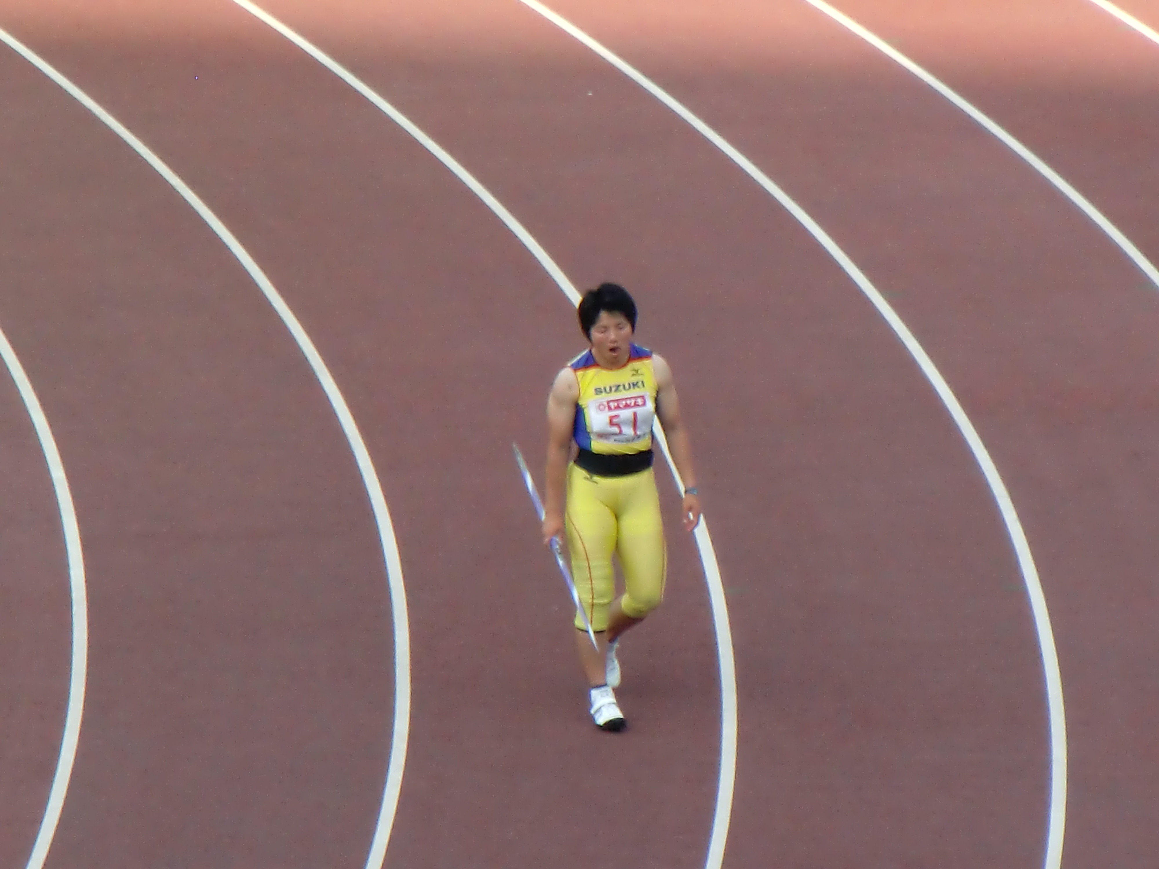 2012年6月10日撮影